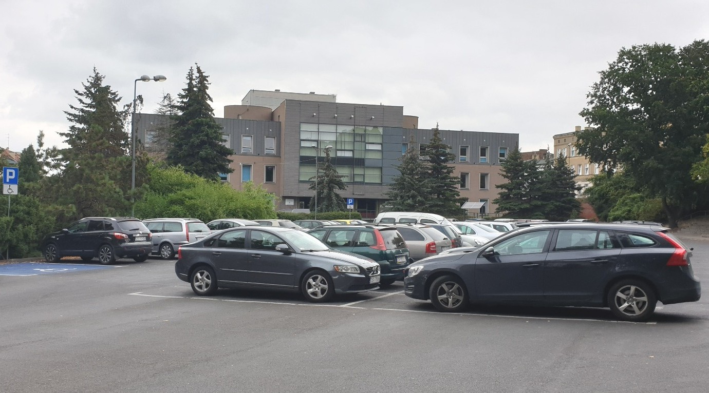 Stargard. Miejsca parkingowe przy SCK